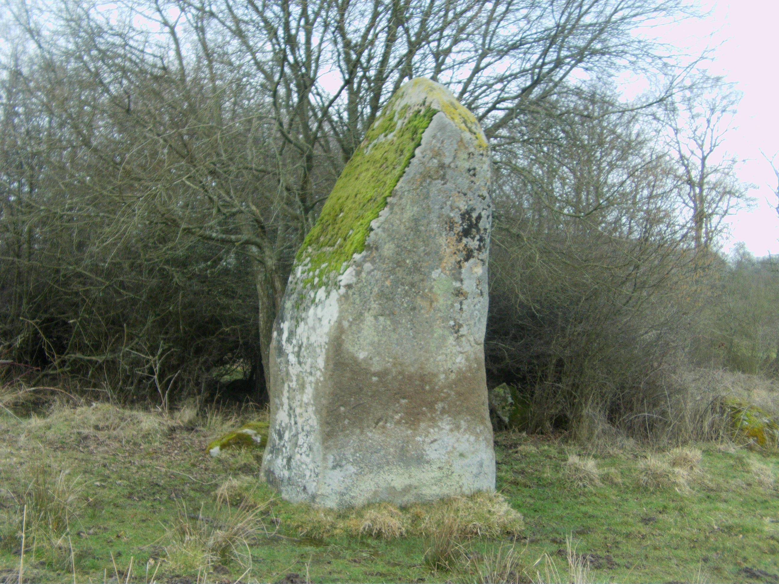 menhir : La Pierre de Gargantua (Craménil sur Rouvre)